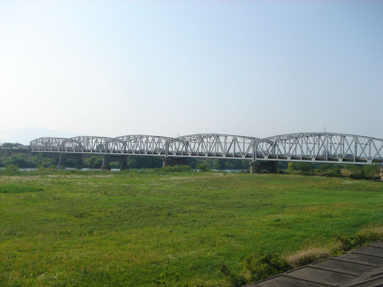 Nagara-Ohashi(長良大橋),Gifu,Gifu,Japan(岐阜県岐阜市で東南(左岸下流)より撮影)